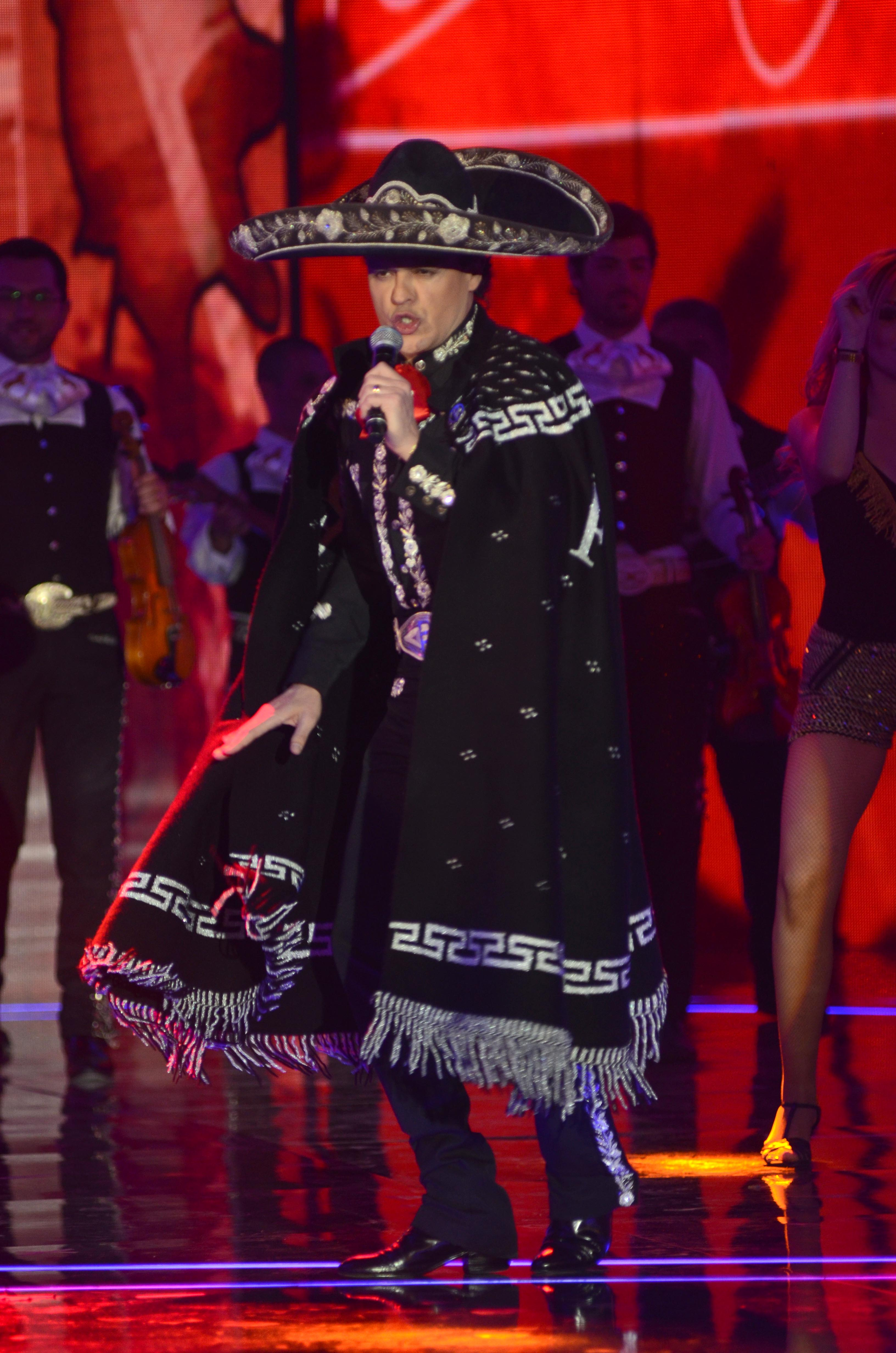 Ministro Elizalde asiste a la Ceremonia Inaugural de la Teletón